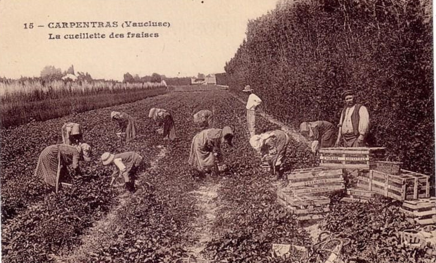 Carpentras Cueillette des fraises